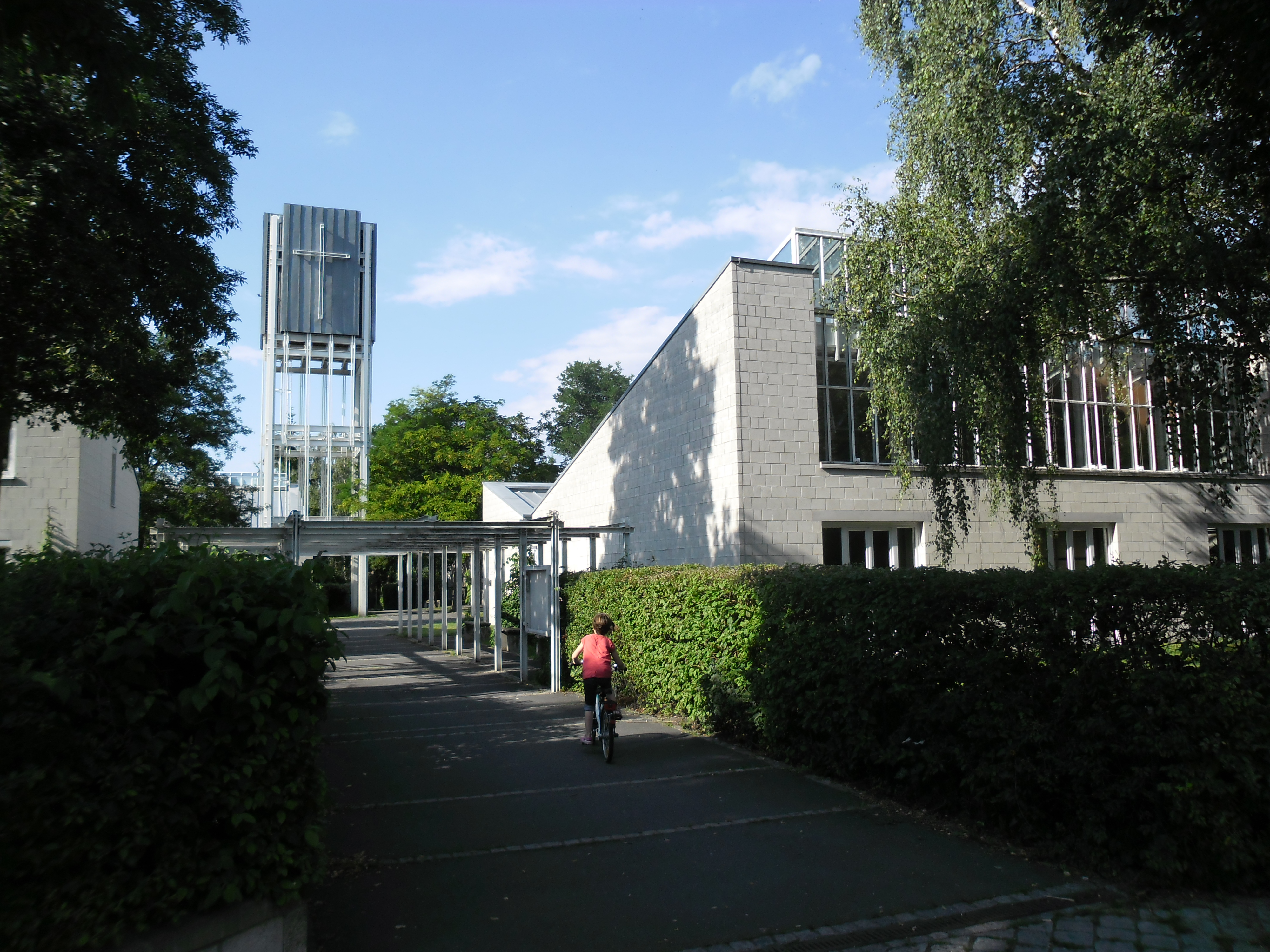 Nördlich des Euckenweges im Stadtbezirk Langwasser Nordost teilt sich die katholische Kirche Sankt-Maximilian-Kolbe im Westen mit der evangelischen Martin-Niemöller-Kirche im Osten einen gemeinsamen Campanile.